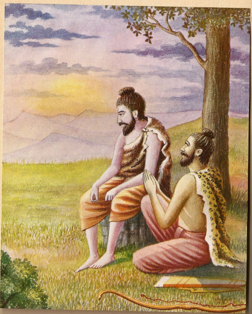 Chitra Ramayana by Ramachandra Madhwa Mahishi, Illustrated by Balasaheb Pandit Pant Pratinidhi, 1916